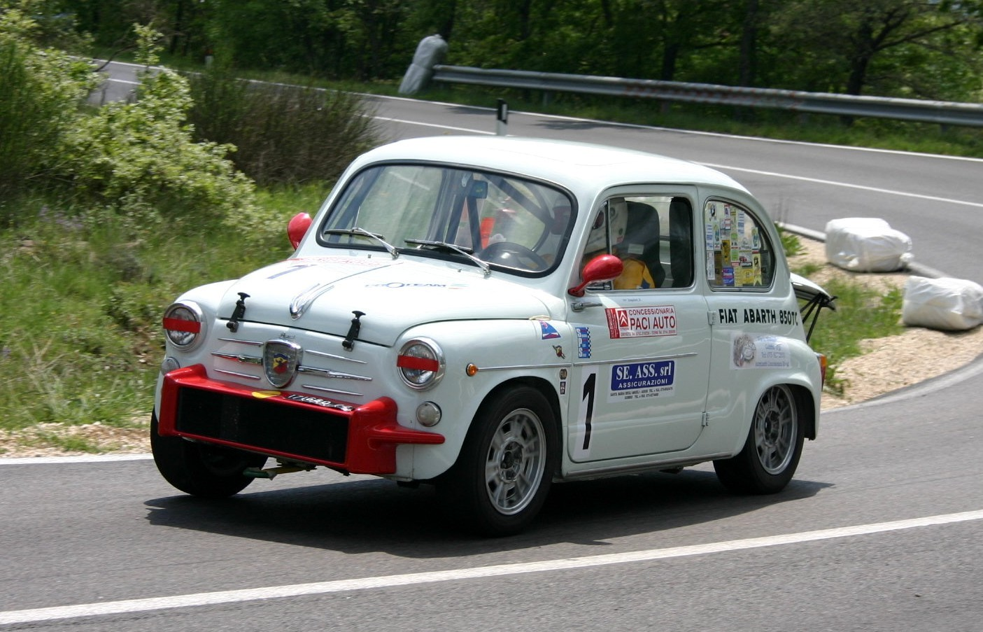 Fotografia di una Abarth 850 durante una corsa tenutasi in Sardegna negli anni '80.